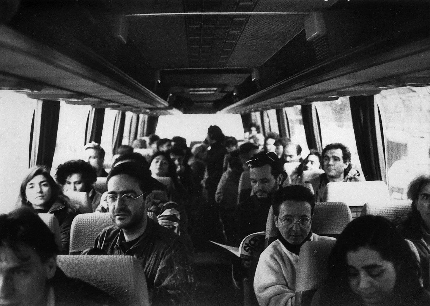 Emilio Fantin, Trekking, 1992 (interno del bus durante il viaggio verso i colli bolognesi)